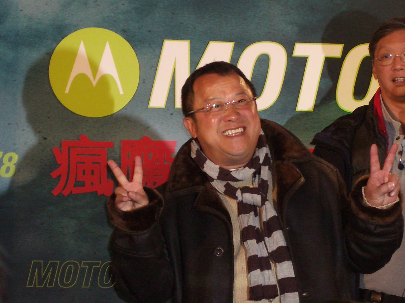 Eric Tsang